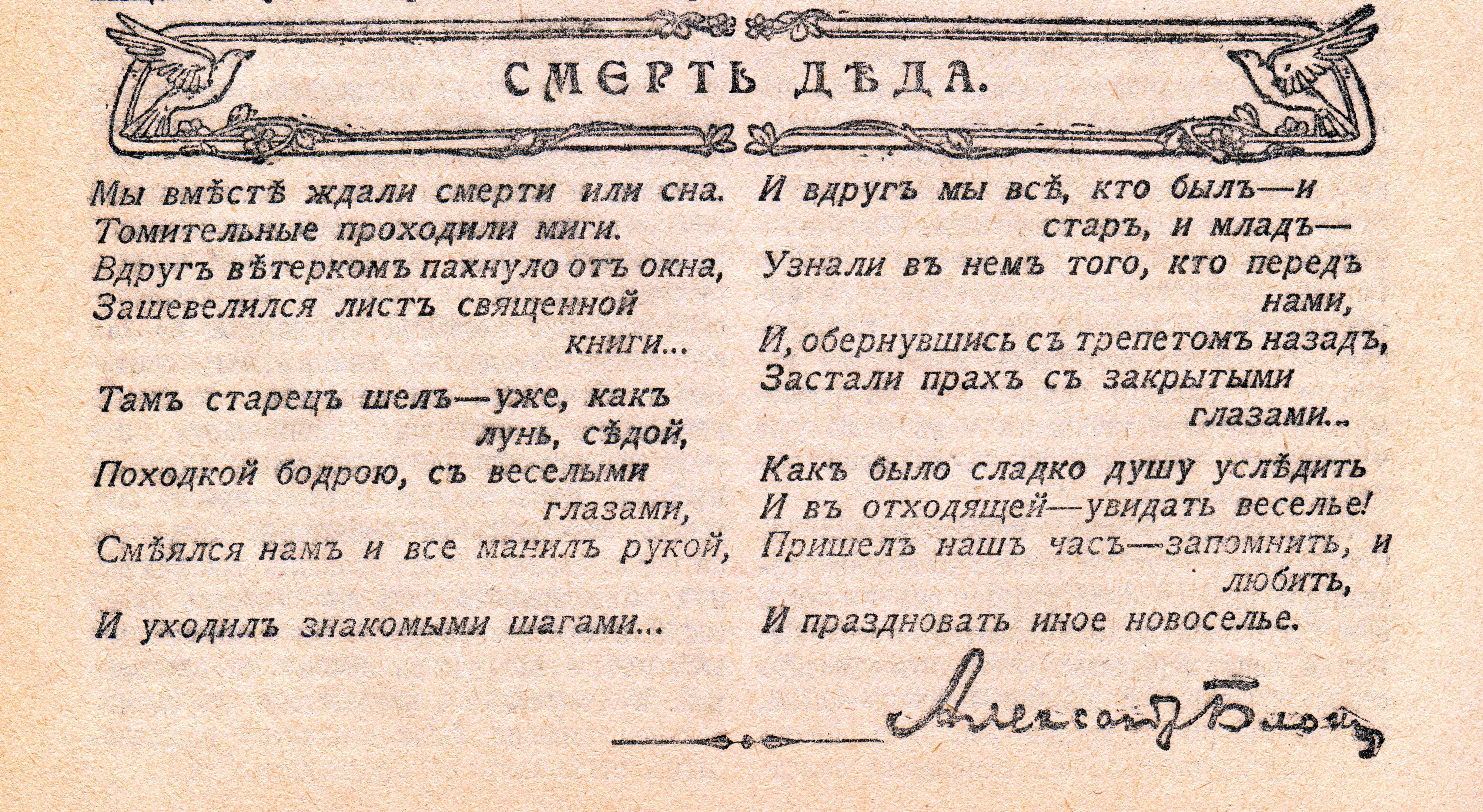 Стихотворение и автограф Александра Блока "На смерть деда" (академика Бекетов, Андрей Николаевич). Ежемесячный журнал "Новое слово", Российская Империя, № 6 (июнь) - 1910 год.